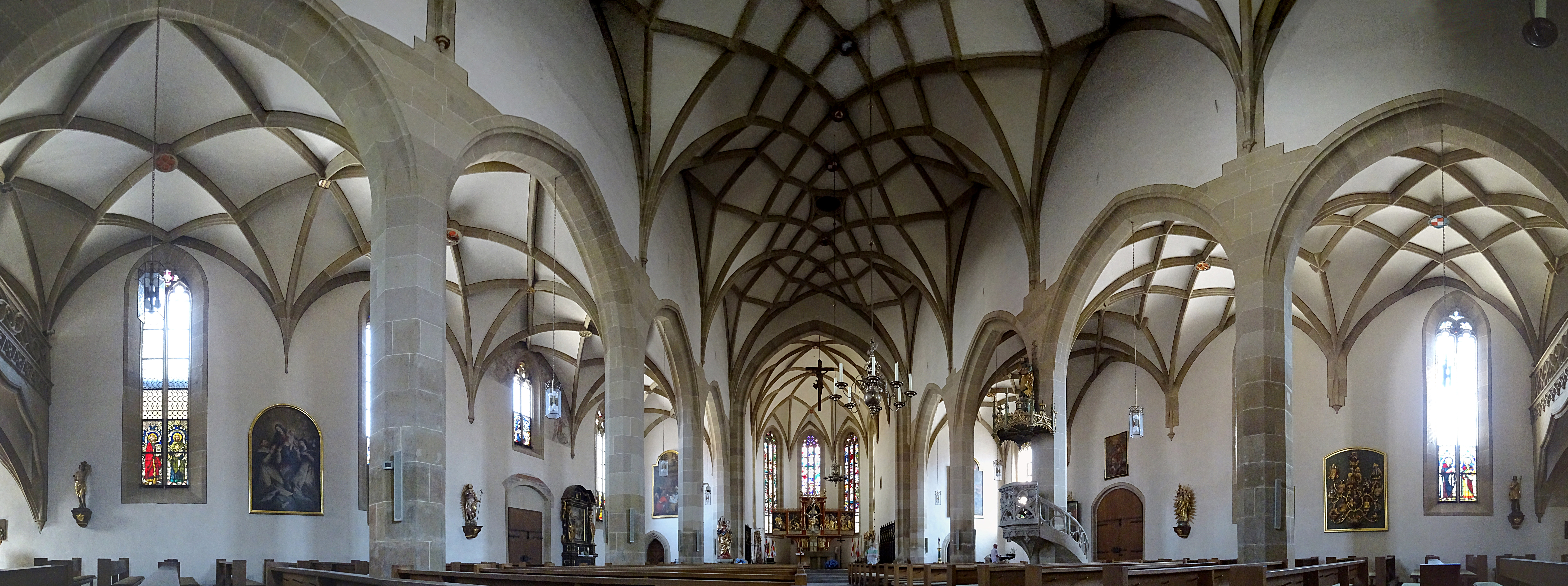 Innenraum Panorama der Stadtpfarrkirche Mariä Himmelfahrt (Bad Königshofen im Grabfeld)